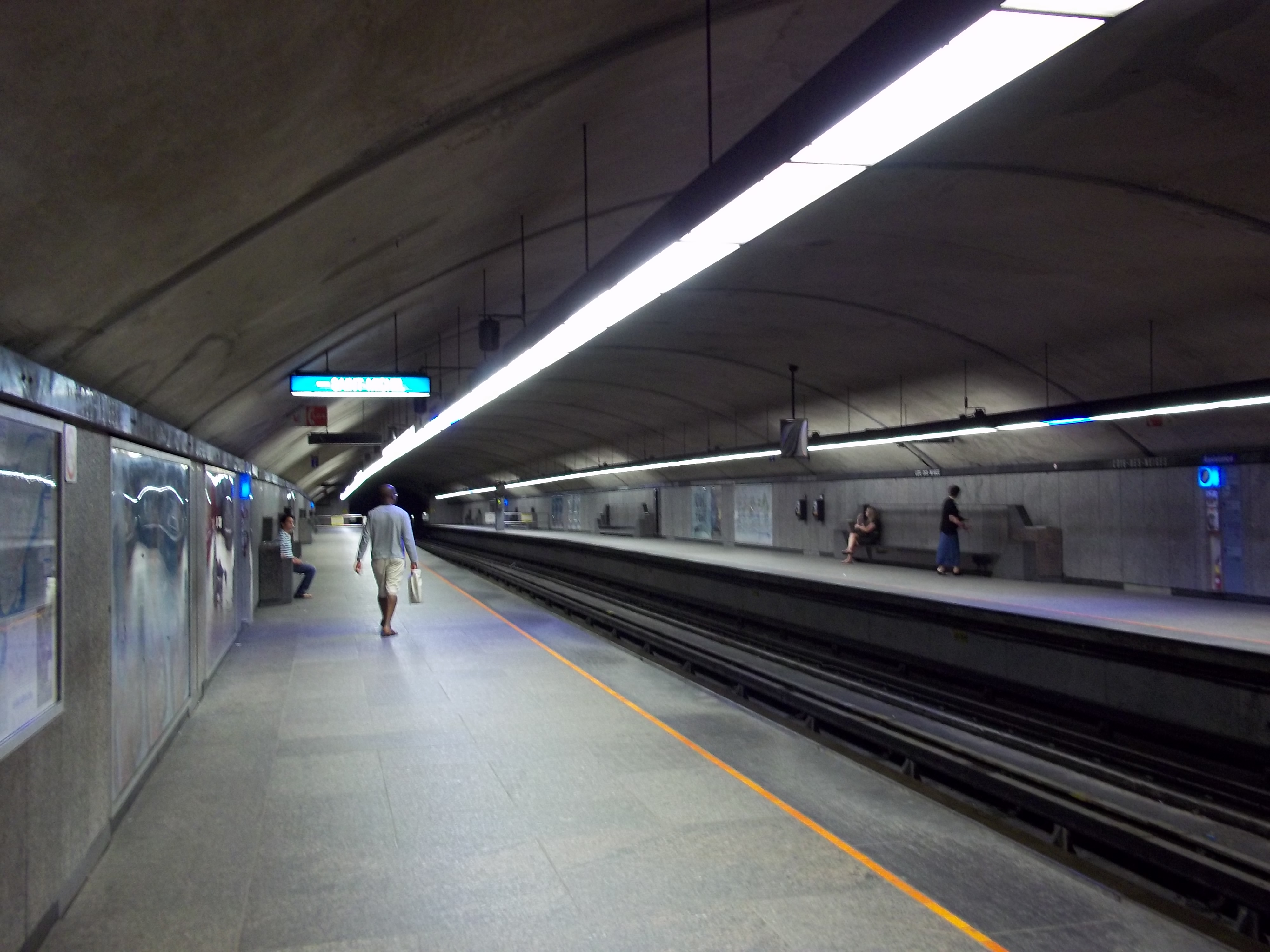 Quai de la station de métro Côte-des-Neiges, Montréal